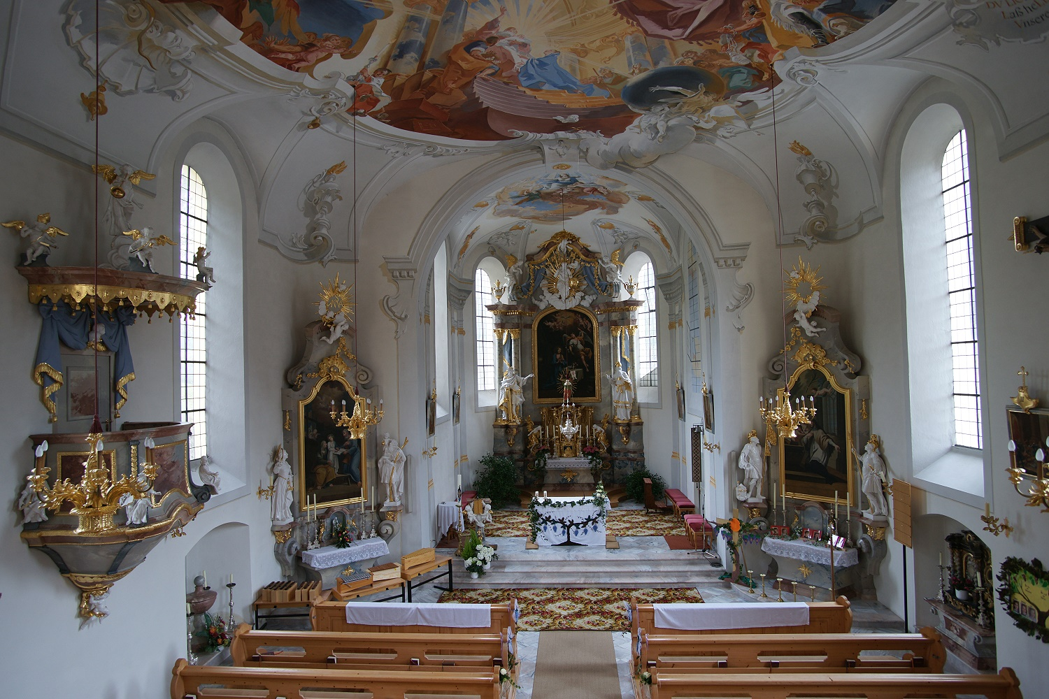 Kath. Pfarrkirche Unserer lieben Frau Maria Reinigung, Friedhofskapelle und Kriegerdenkmal beim Friedhof. Innenansicht. Bach, Tirol.